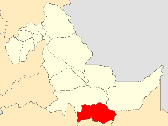 Mapa distrito Sepahua,Ucayali - Perú